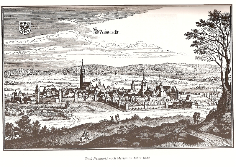 Neumarkt 1644, nach einem Kupferstich von Merian